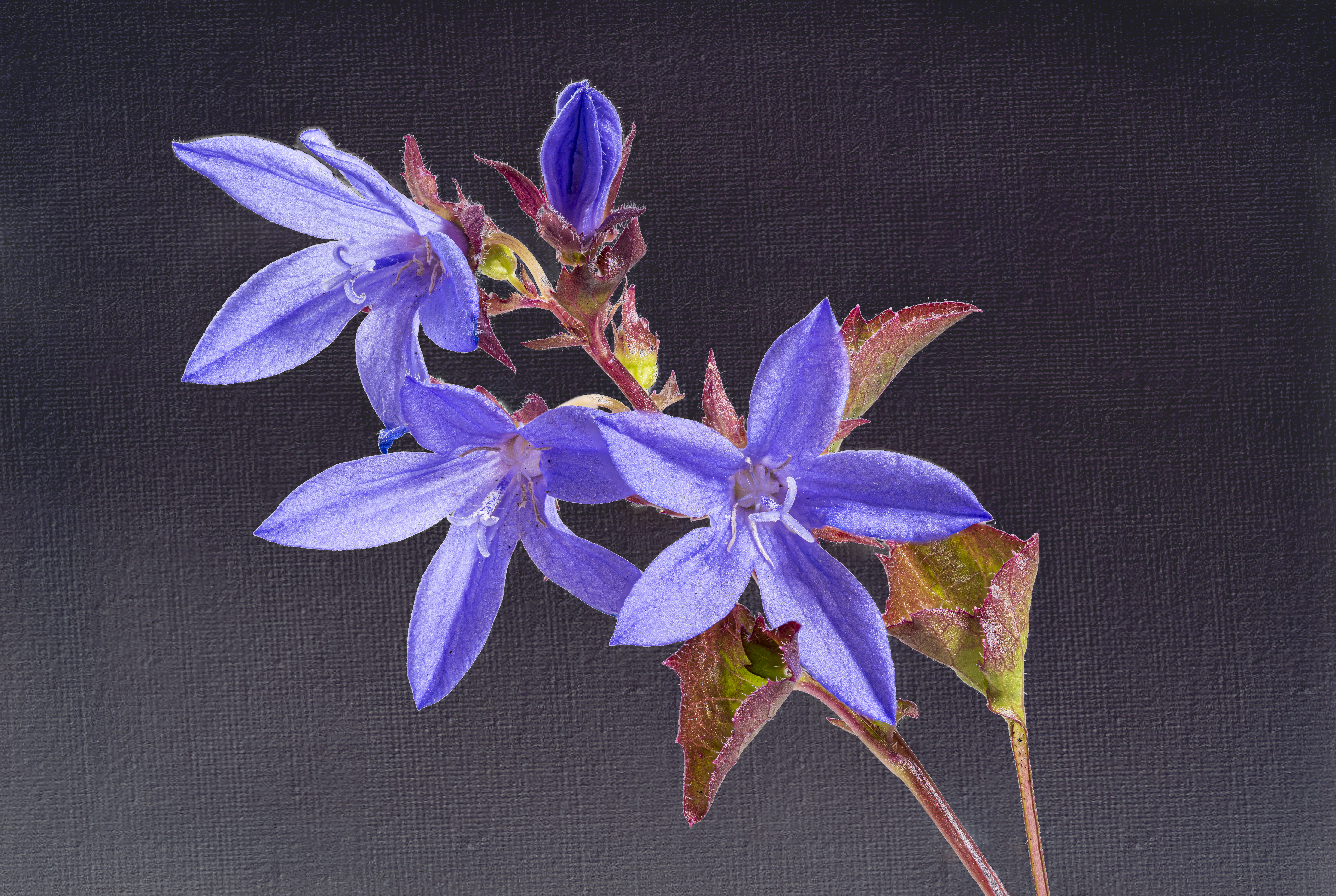 Famille : Campanulaceae Genre : Campanula L. Espèce : Campanula poscharskyana Degen